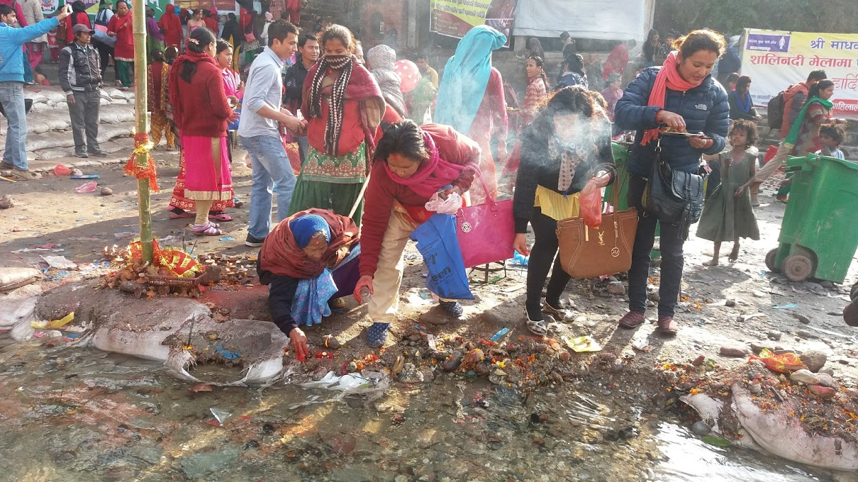 नेपाली: शाली नदीमा माघ महिनामा लाग्ने मेलामा सहभागी दर्शनार्थीहरु